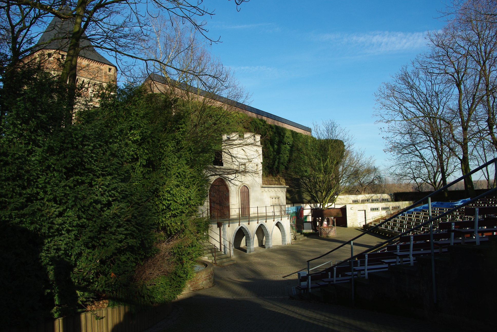 Die Zonser Freilichtbühne im ehemaligen Zwinger der Burg Friedestrom